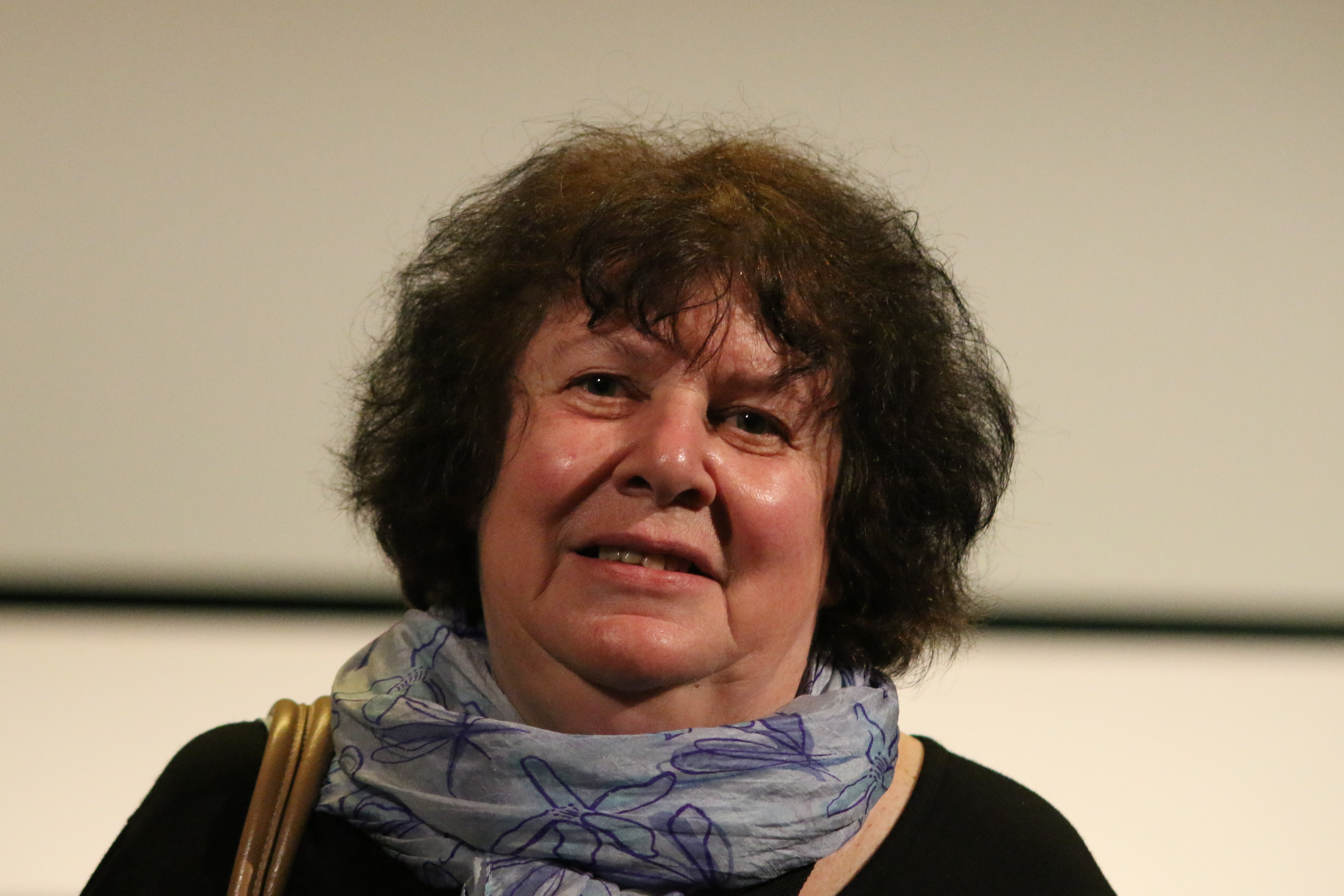 15. GoEast Festival, Wiesbaden 2015: Die russische Produzentin Marina Razbezhkina